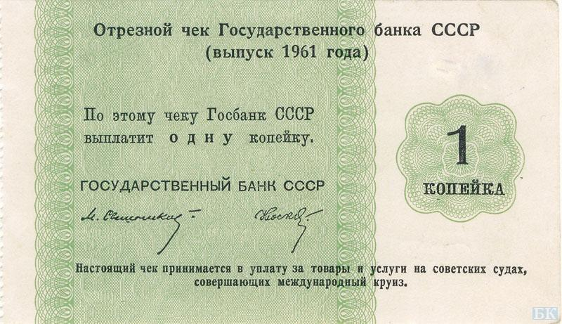 1 копейка Госбанка СССР 1961 года. Аверс.